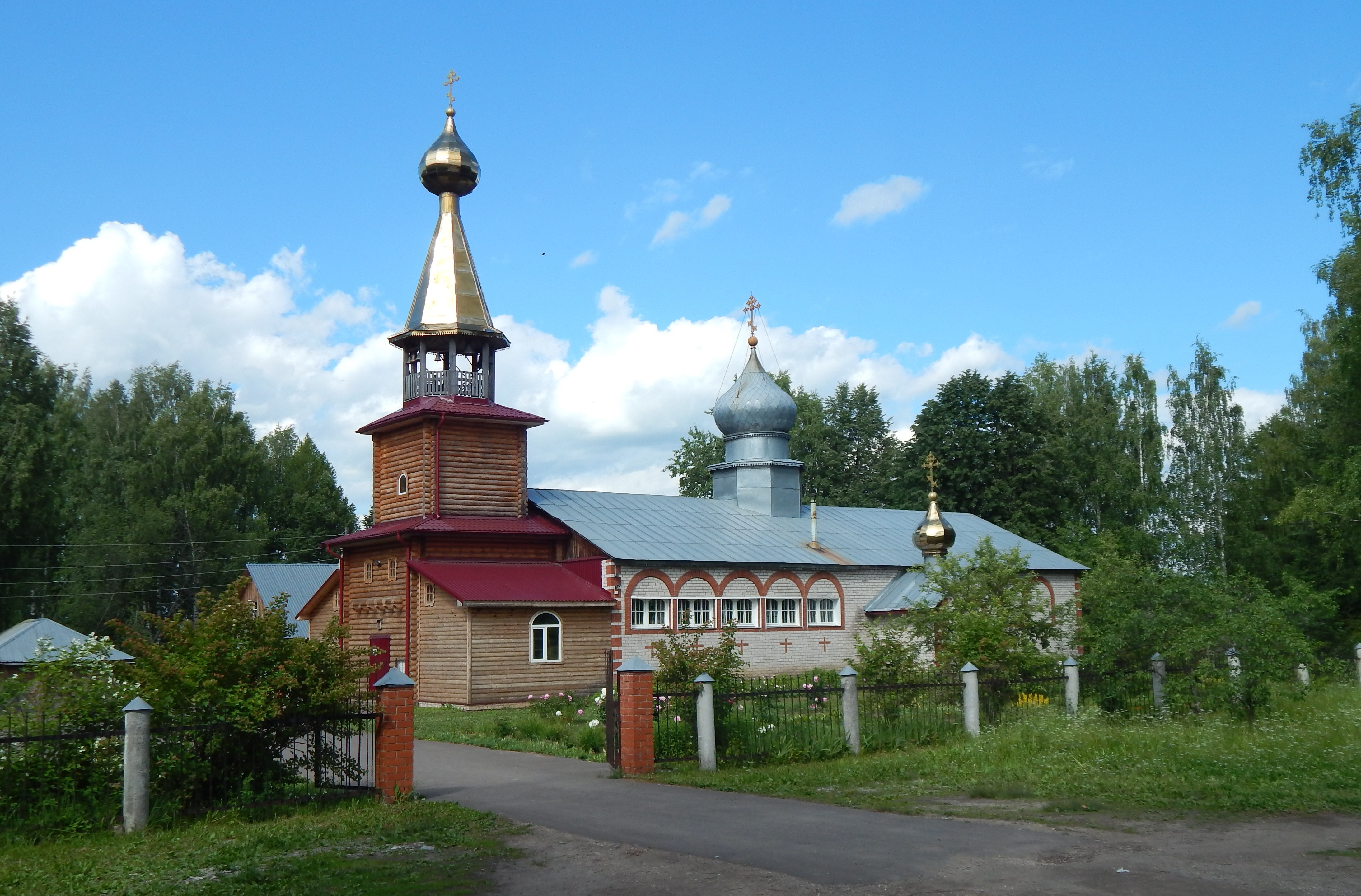 Никольский храм в Свече